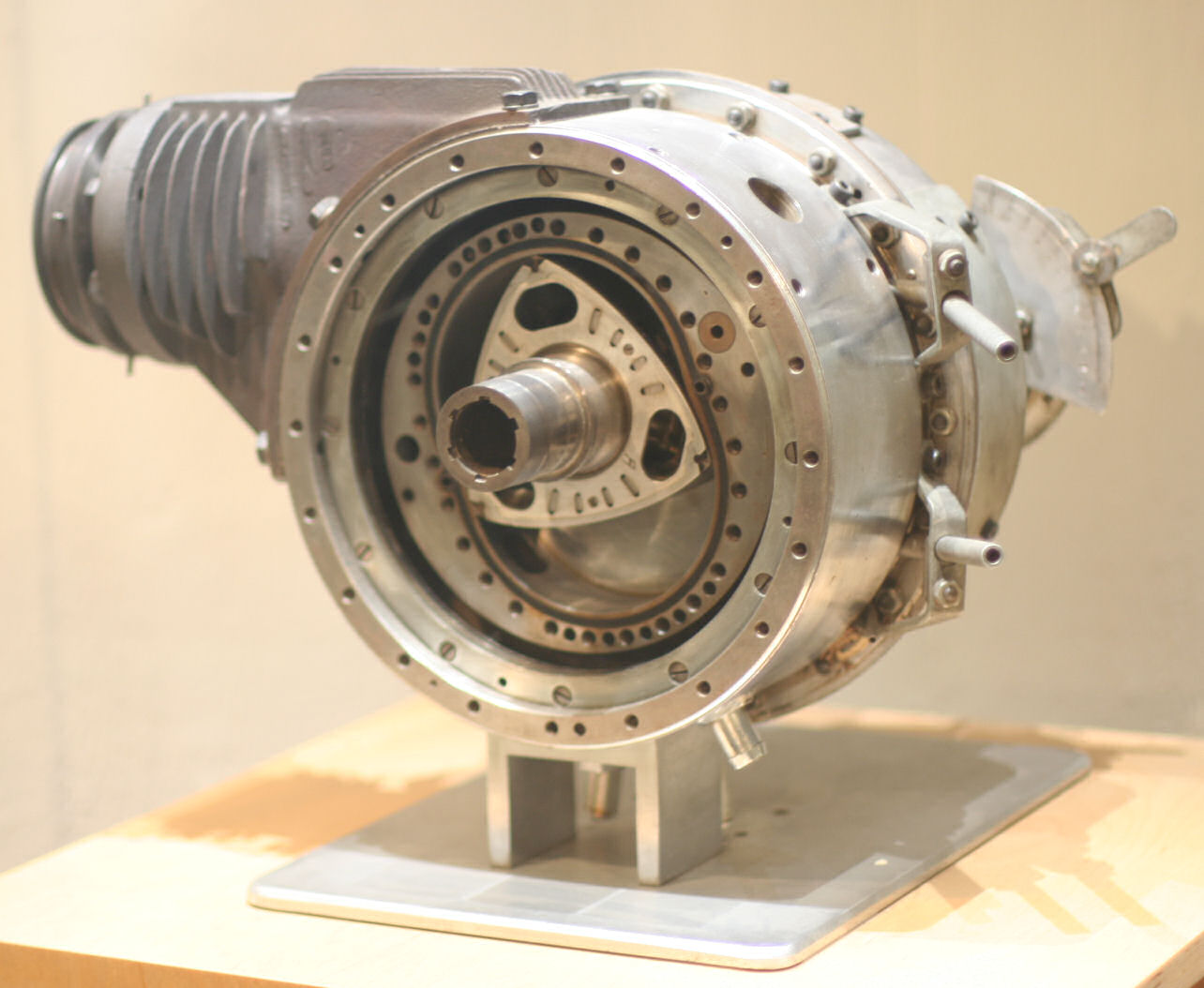 Drehkolbenmotor DKM 54 von Felix Wankel. Das Exponat ist im Deutschen Museum Bonn ausgestellt ( Fotograf: Ralf Pfeifer Lizenzstatus: GNU FDL. Durch den Fotografen hochgeladen und zur Verfügung gestellt. Datum: 09.10.2005